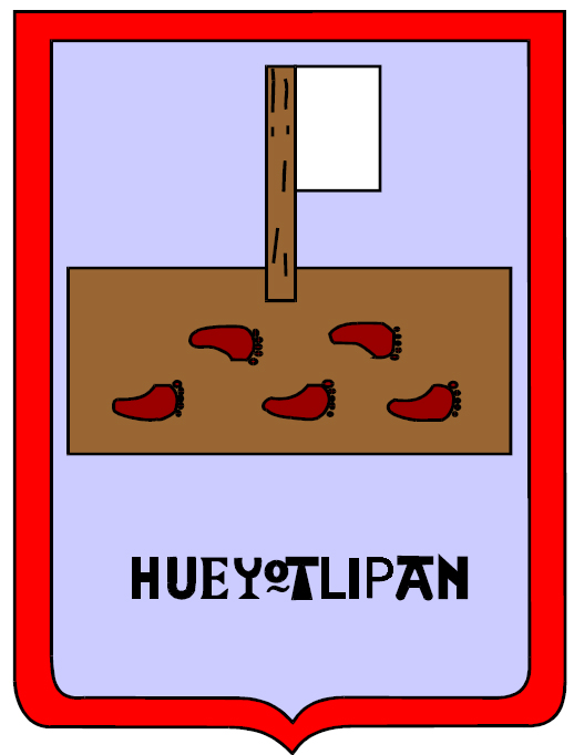 Escudo de Hueyotlipan